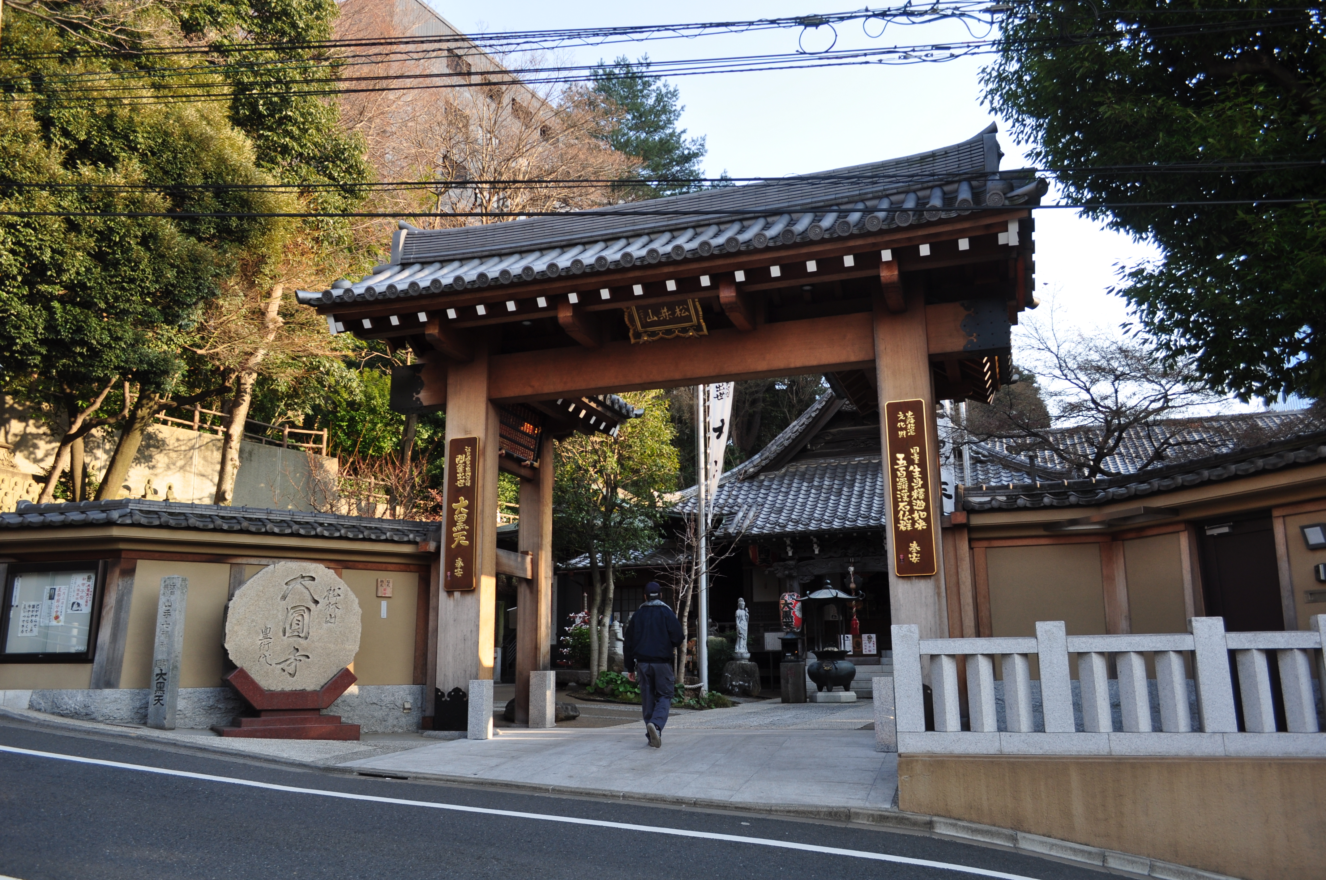 松林山大圓寺